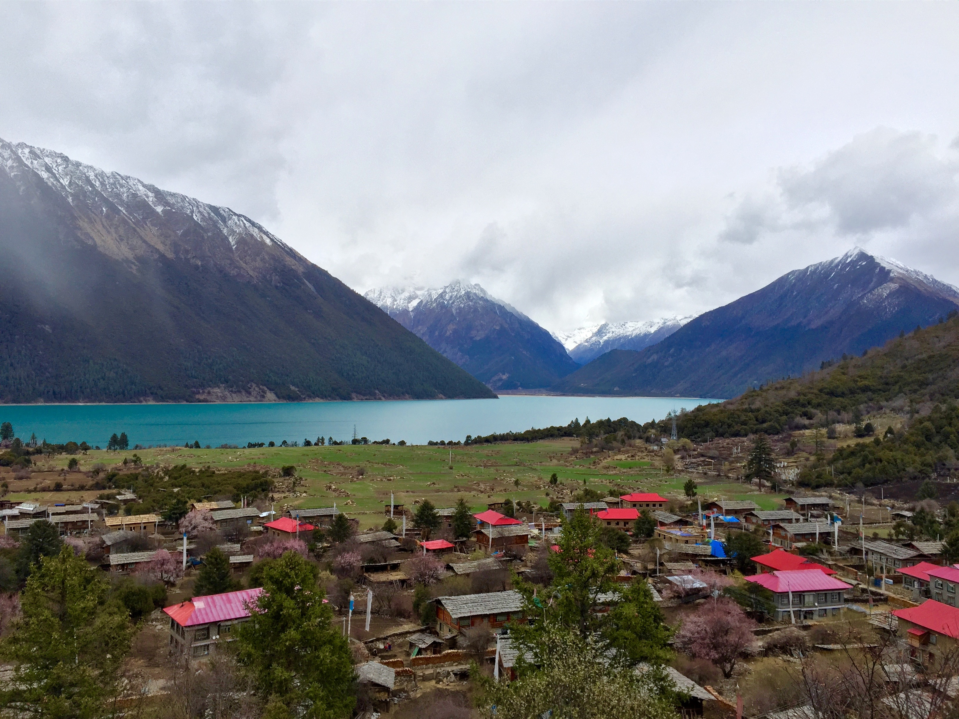 Gongbo'gyamda, Nyingchi, Tibet, China